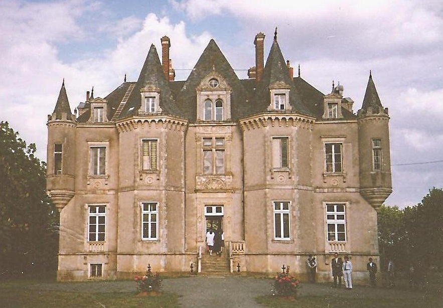 Château dit de la Grange Moreau sis à Vallon sur Gée (Sarthe)